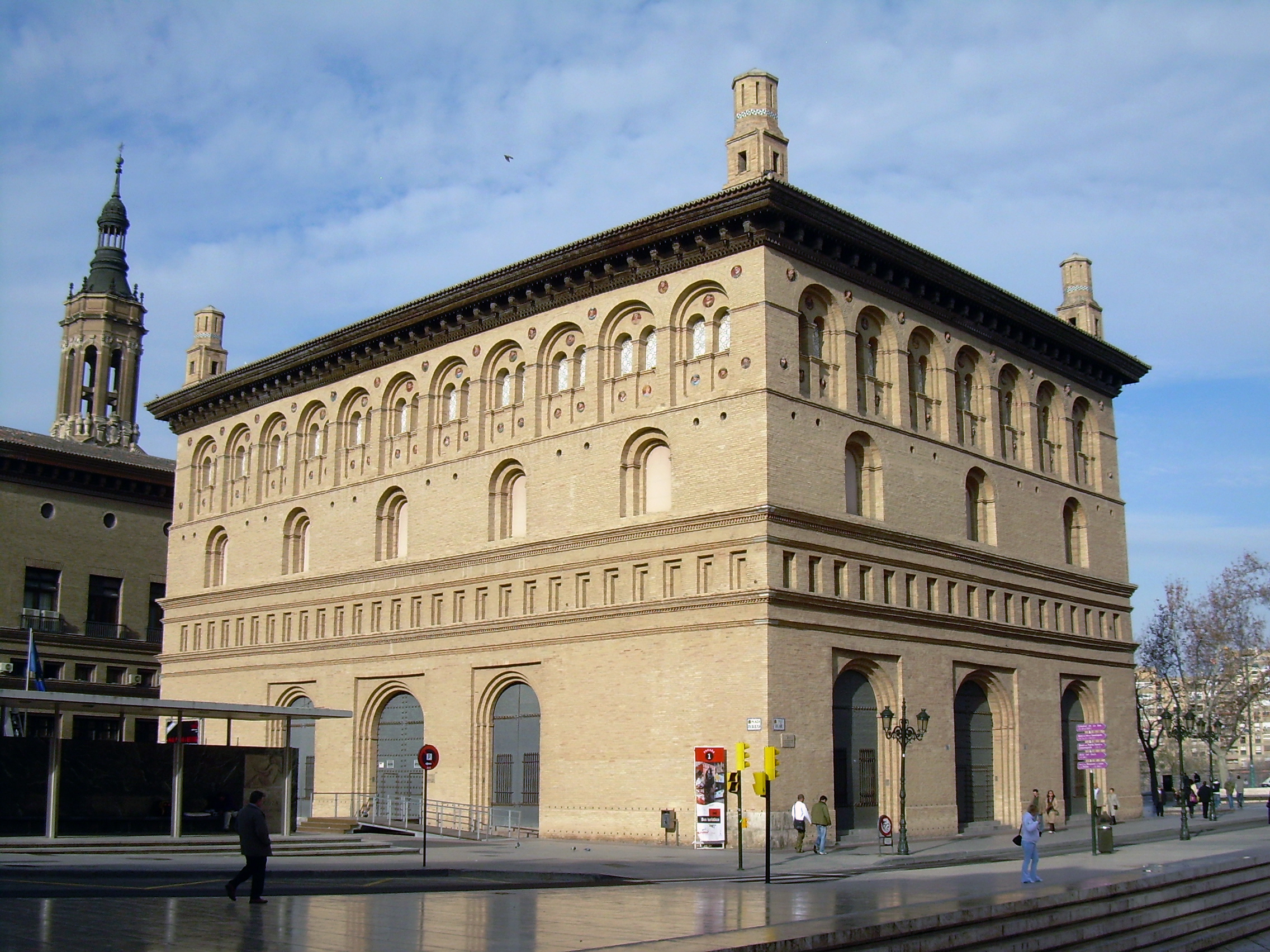 Lonja de mercaderes de Zaragoza, de la época renacentista, actualmente utilizada como sala de exposiciones temporales.